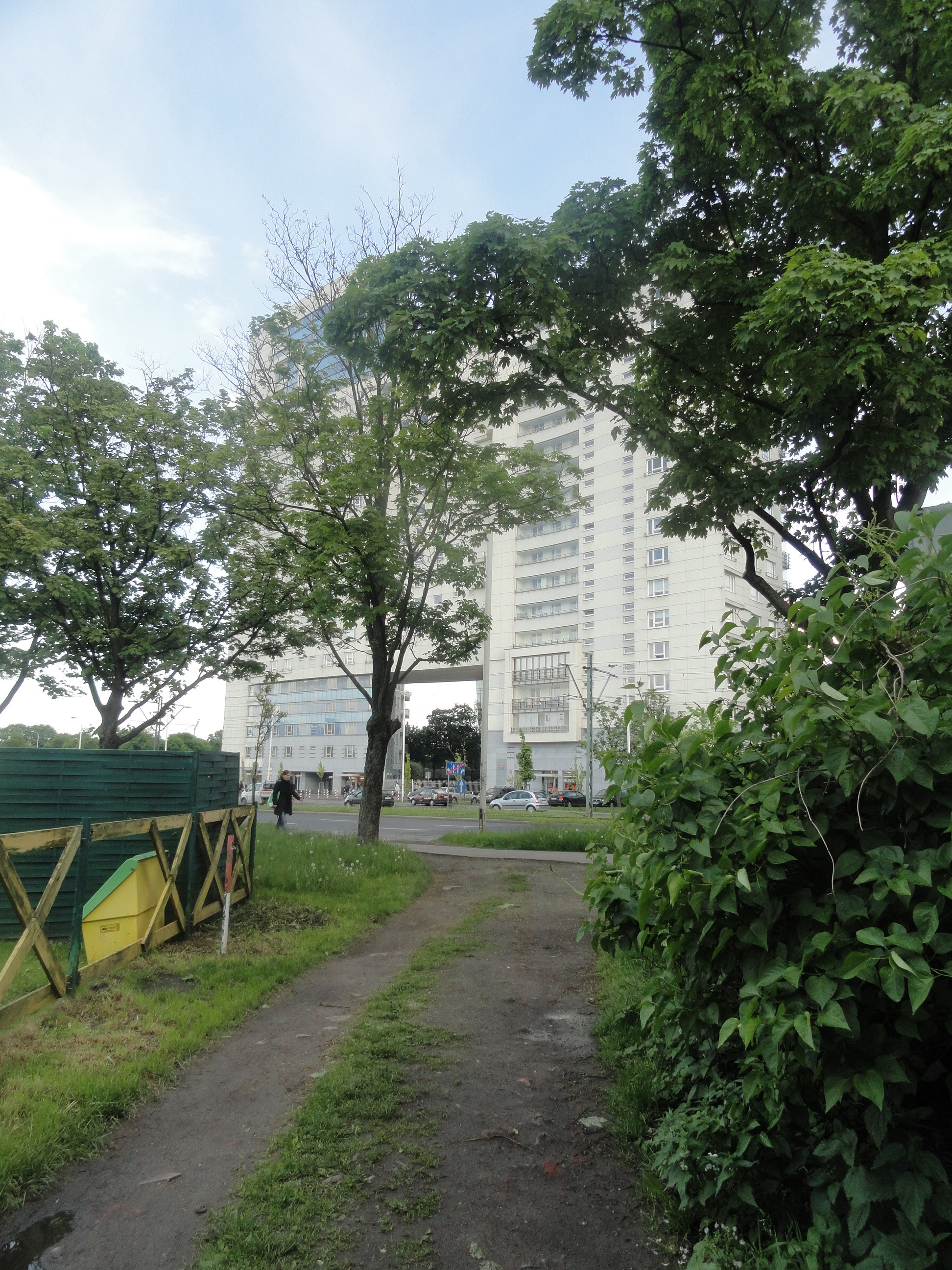 Skrzyżowanie Kłopotu ze Słomińskiego; w tle brama w przebiegu historycznego Kłopotu.